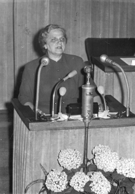 Illus-Sturm 9.5.1951- Volkskammer beschließt Volksbefragung Am 9. Mai 1951, fand in Berlin eine Sitzung der Volkskammer statt, auf der der Stellvertretende Ministerpräsident Walter Ulbricht über die Volksbefragung in der DDR sprach. UBz: Diskussion zum Referat Walter Ulbricht. (Roberta Gropper, DFD) bei ihrer Diskussionsrede.